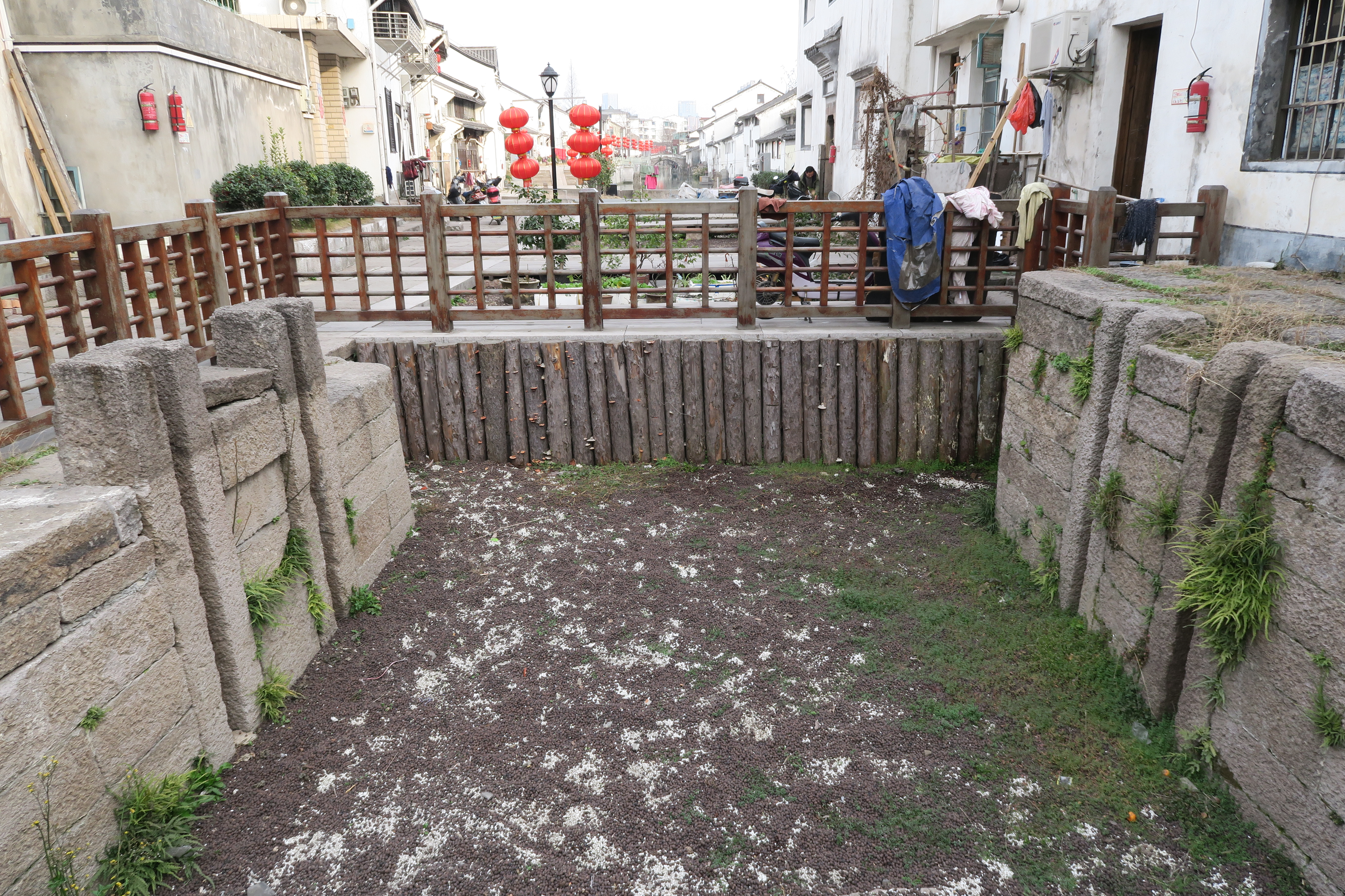 永兴闸遗址两侧闸门